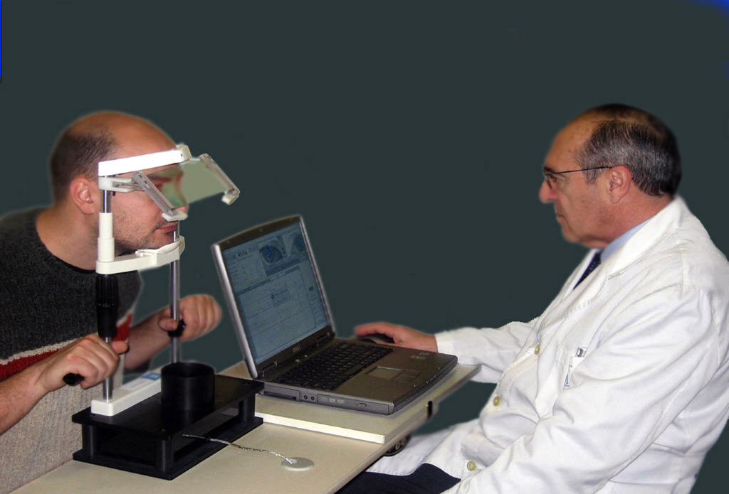 Exploración de la motilidad ocular por video-oculografía.